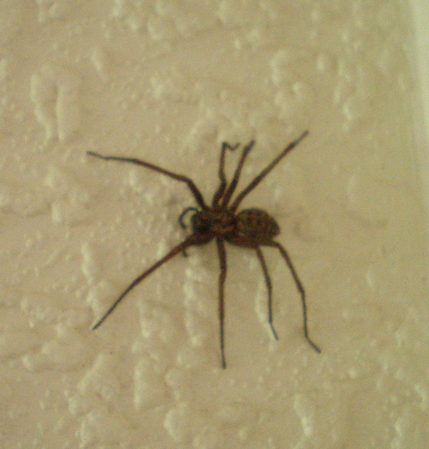 Tegenaria atrica